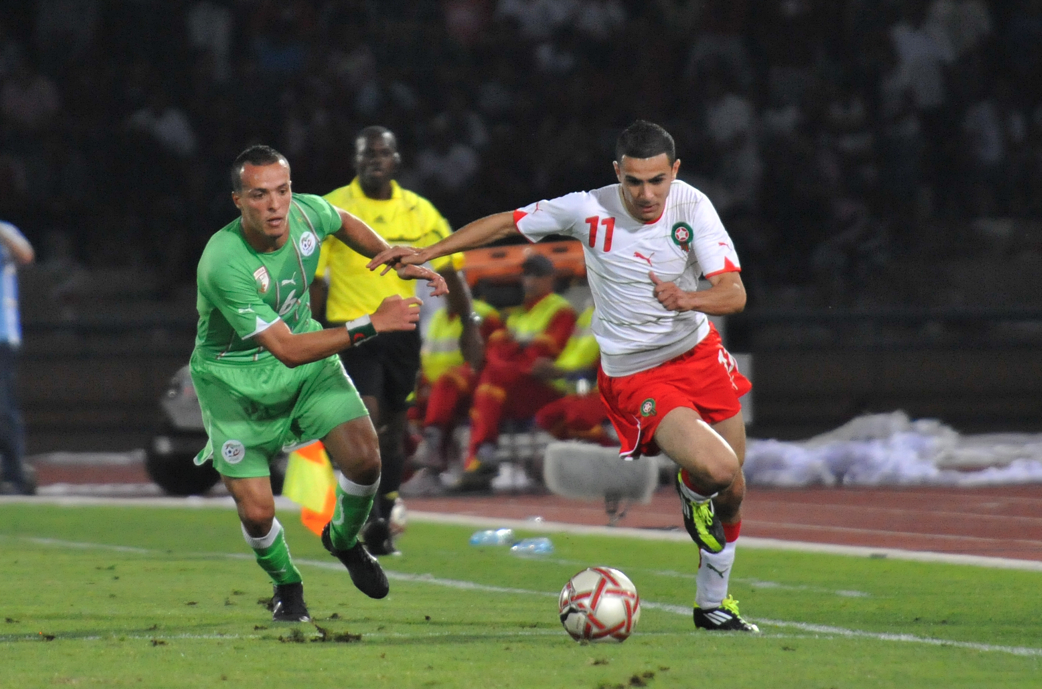 Match Maroc - Algérie